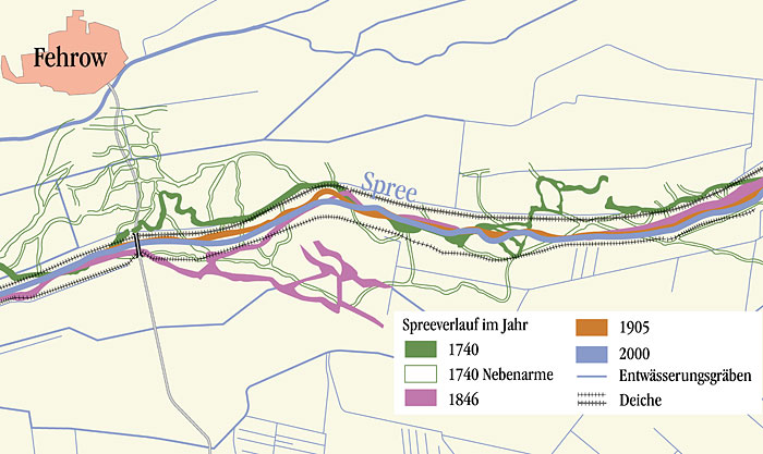 Schrittweise Reduzierung der Spreeaue durch Meloration und Eindeichung